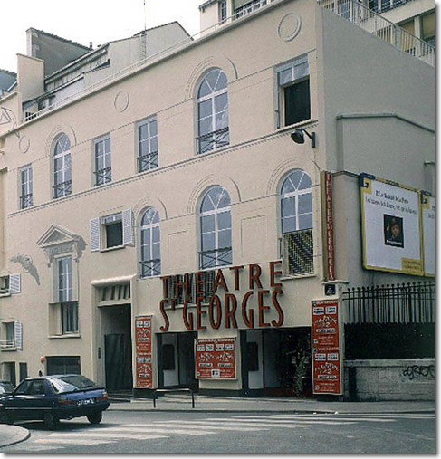 Le Théâtre Saint-Georges Trompe-l'oeil architectural, anamorphose Peinture murale de Dominique Antony Photo de Ph. Guerin